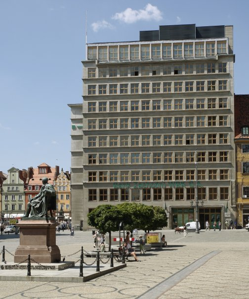 Budynek centrali Banku Zachodniego WBK we Wrocławiu, Rynek 9-11